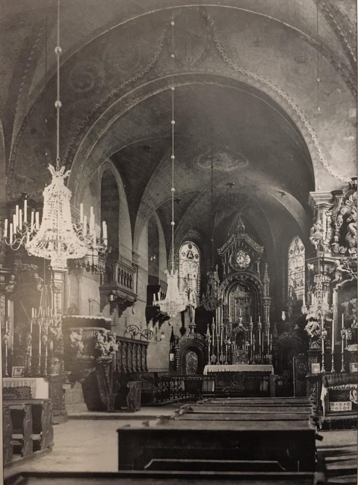 Костел Марії Сніжної. Колишній інтер'єр